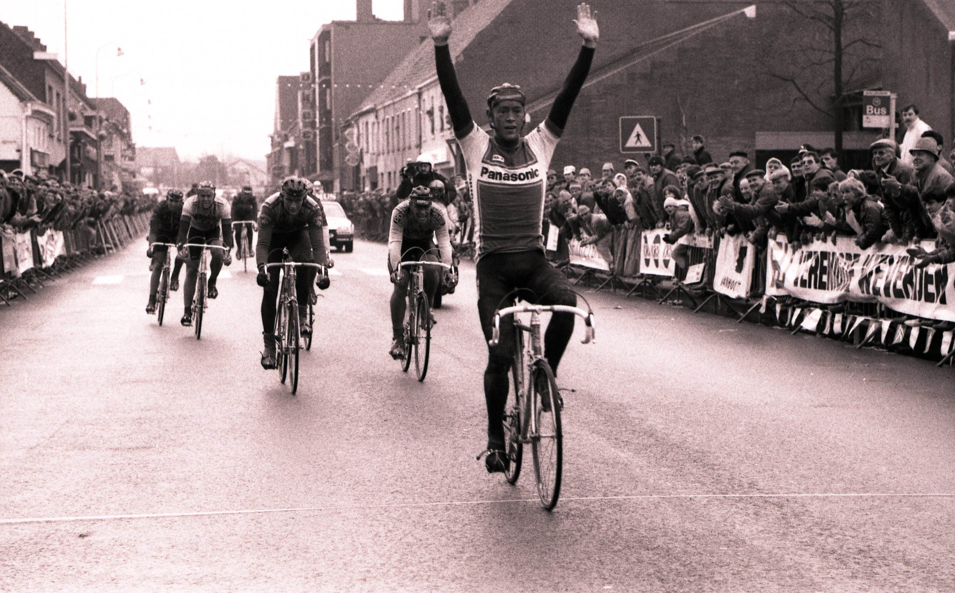 In 1986 toont Eric Vanderaerden zich de snelste van een compacte kopgroep. Na een derde (1983) en tweede (1985) plaats pakt de Limburger voor het eerst de zege.